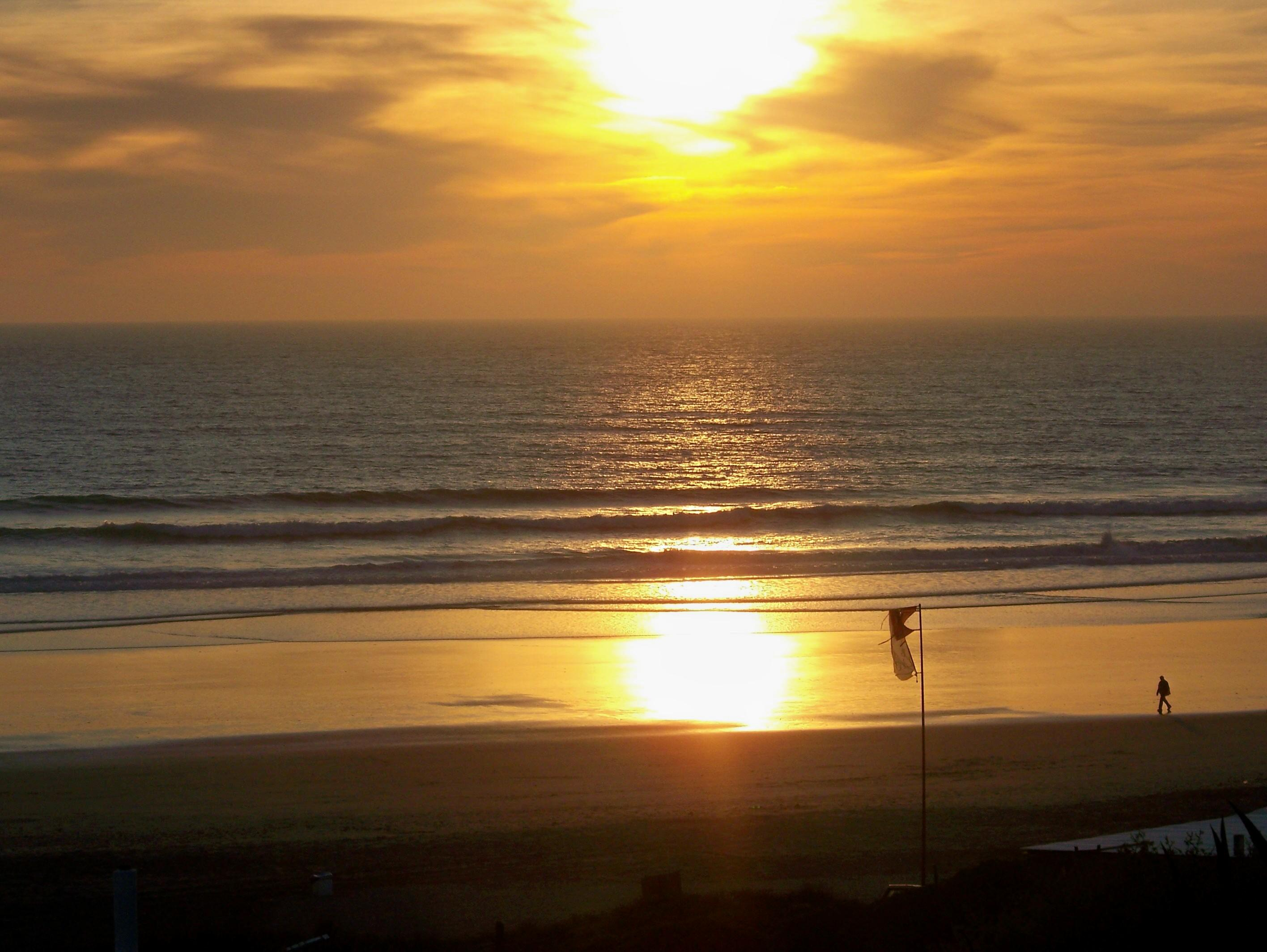 Puesta de Sol.